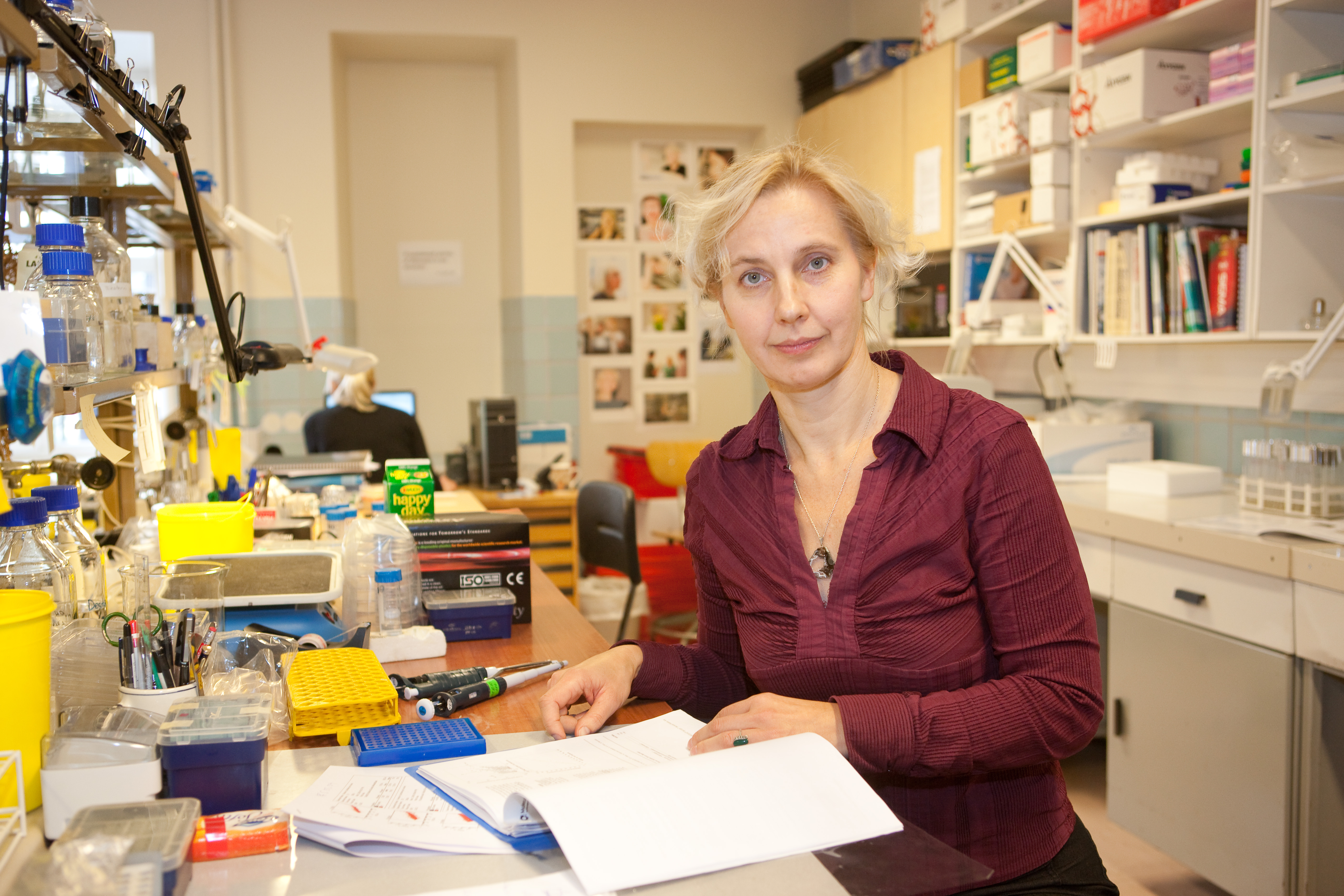 TÜ Molekulaar- ja Rakubioloogia Instituudi mikroobigeneetika professor Maia Kivisaar.